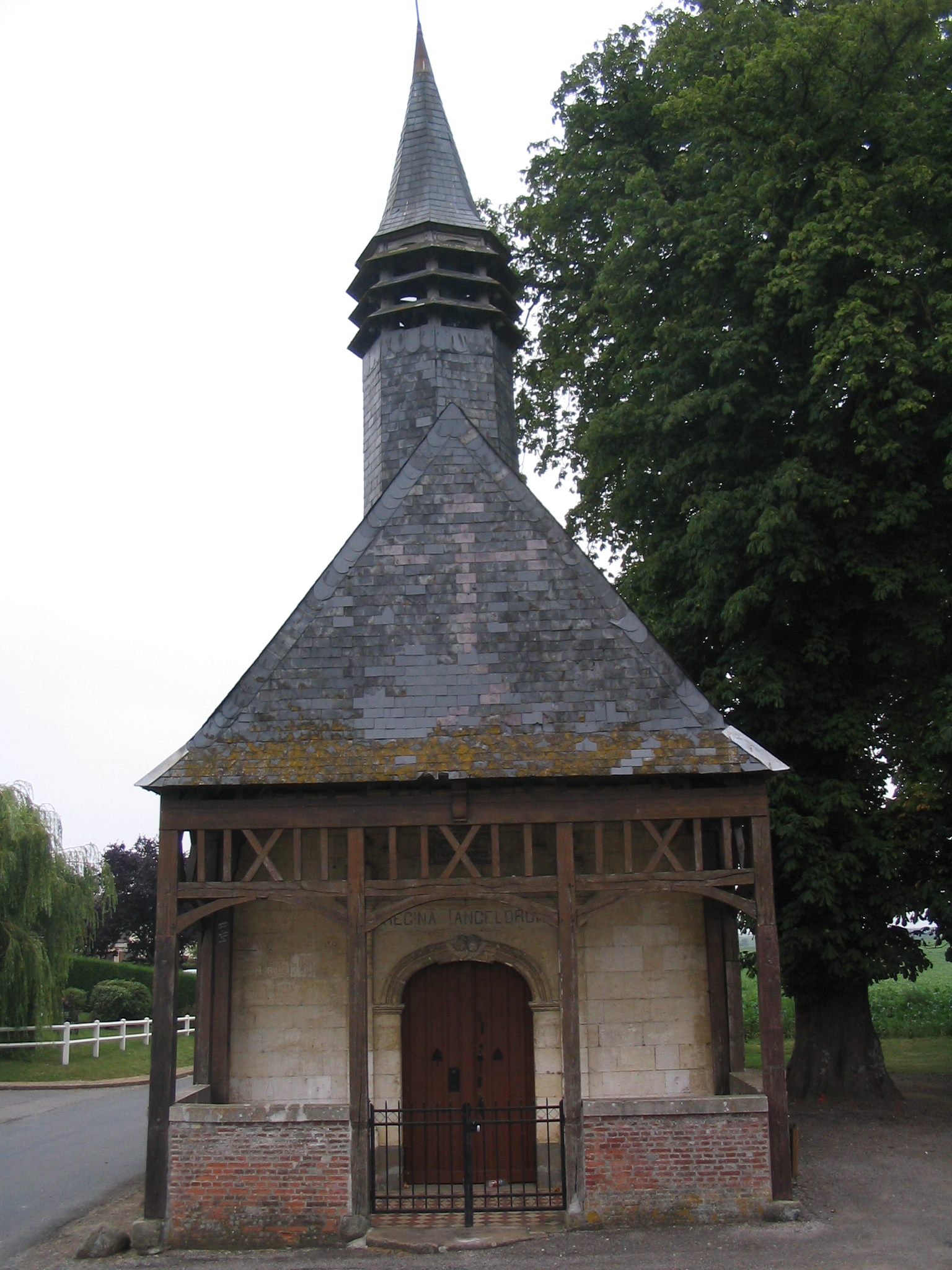 Chapelle située à Gannes (Oise) sur la D164